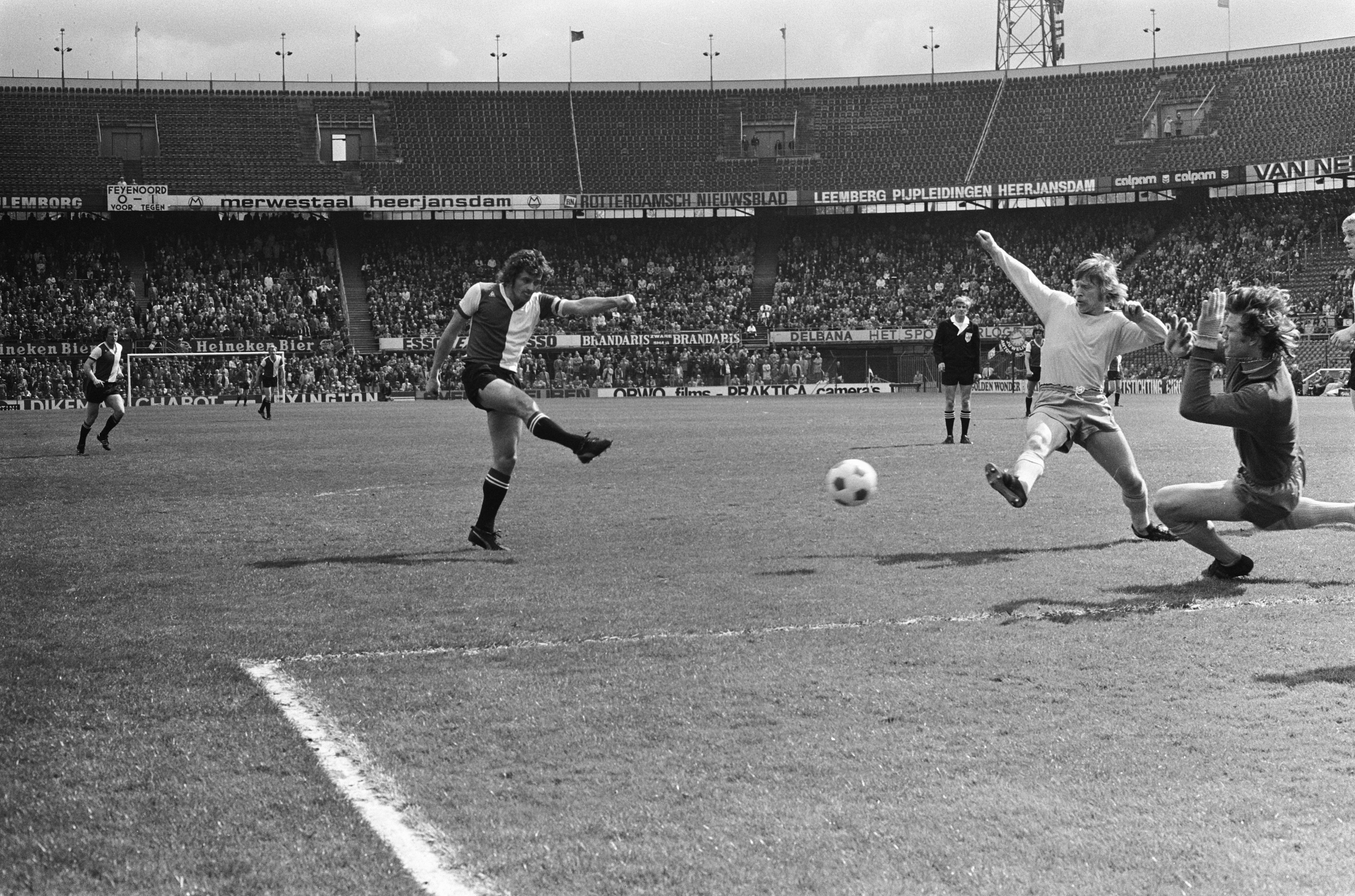 Collectie / Archief : Fotocollectie Anefo Reportage / Serie : Feyenoord-Telstar 4-1 Beschrijving : Jörgen Kristensen (Feyenoord) scoort langs keeper Jaap Bloem (Telstar) Datum : 4 mei 1975 Locatie : Rotterdam, Zuid-Holland Trefwoorden : doelpunten, keepers, spelers, sport, voetbal, wedstrijden Persoonsnaam : Bloem, Jaap, Kristensen, Jörgen Fotograaf : Fotograaf Onbekend / Anefo Auteursrechthebbende : Nationaal Archief Materiaalsoort : Negatief (zwart/wit) Nummer archiefinventaris : bekijk toegang 2.24.01.05 Bestanddeelnummer : 927-9122 Reacties Geplaatst door Paul de Wit op 20 mei 2013 - 23:59. Wat een verrassing! Een foto van mijn favoriete Feyenoorder, de tovenaar van Fop, de Deense linksbuiten die met zijn RECHTER voet scoort.- en de aanvoerdersband draagt? Reuze bedankt Paul de Wit (MITI) - Dutch Translations 62 Pearl Road Walthamstow, London E17 4QZ Phone: 020 - 8223 0544 Fax: 020 - 8223 0237 Mobile: 07947 - 922433